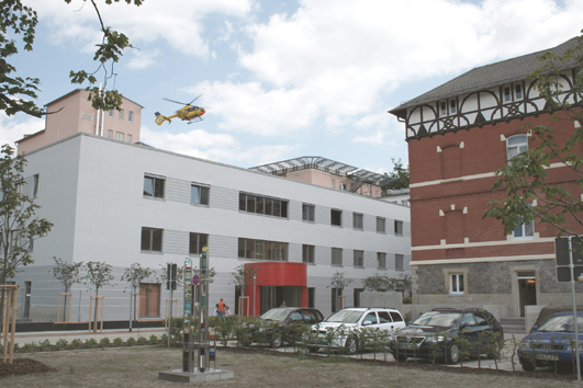 Eingangsgebäude am Klinikstandort Pößneck